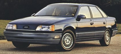 1987FordTaurusLX